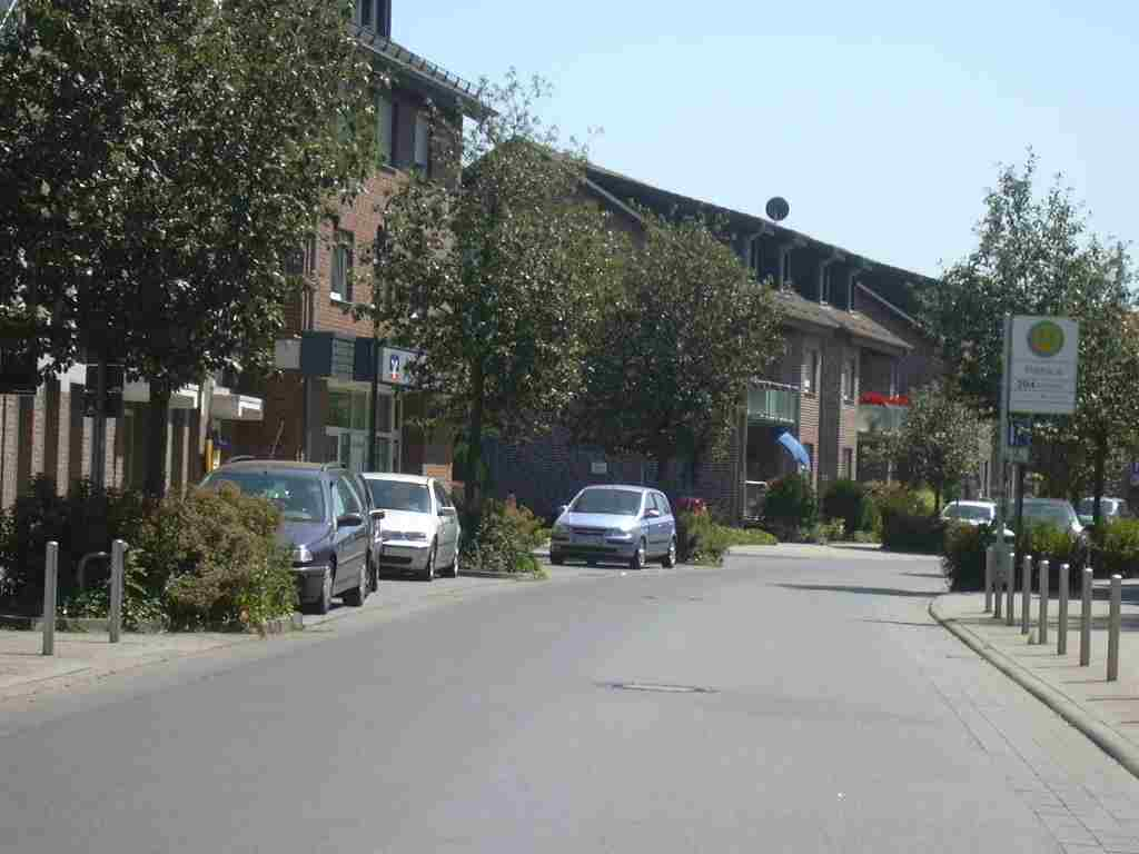 Ortsdurchfahrt Inden Own Work papa1234 2006-07-14